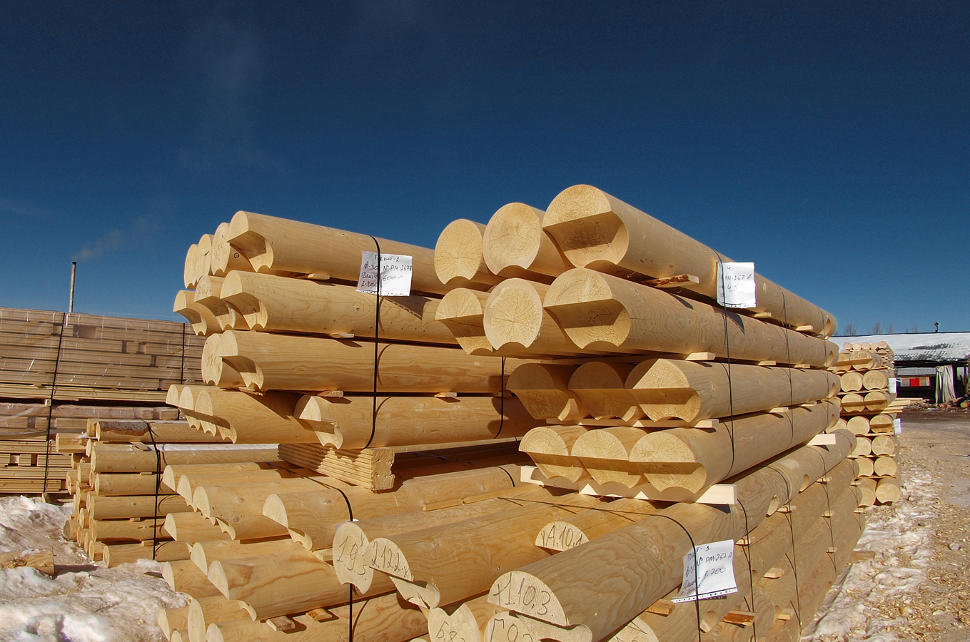 Комплекты домов из оцилинрованного бревна, готовые к отправке покупателю